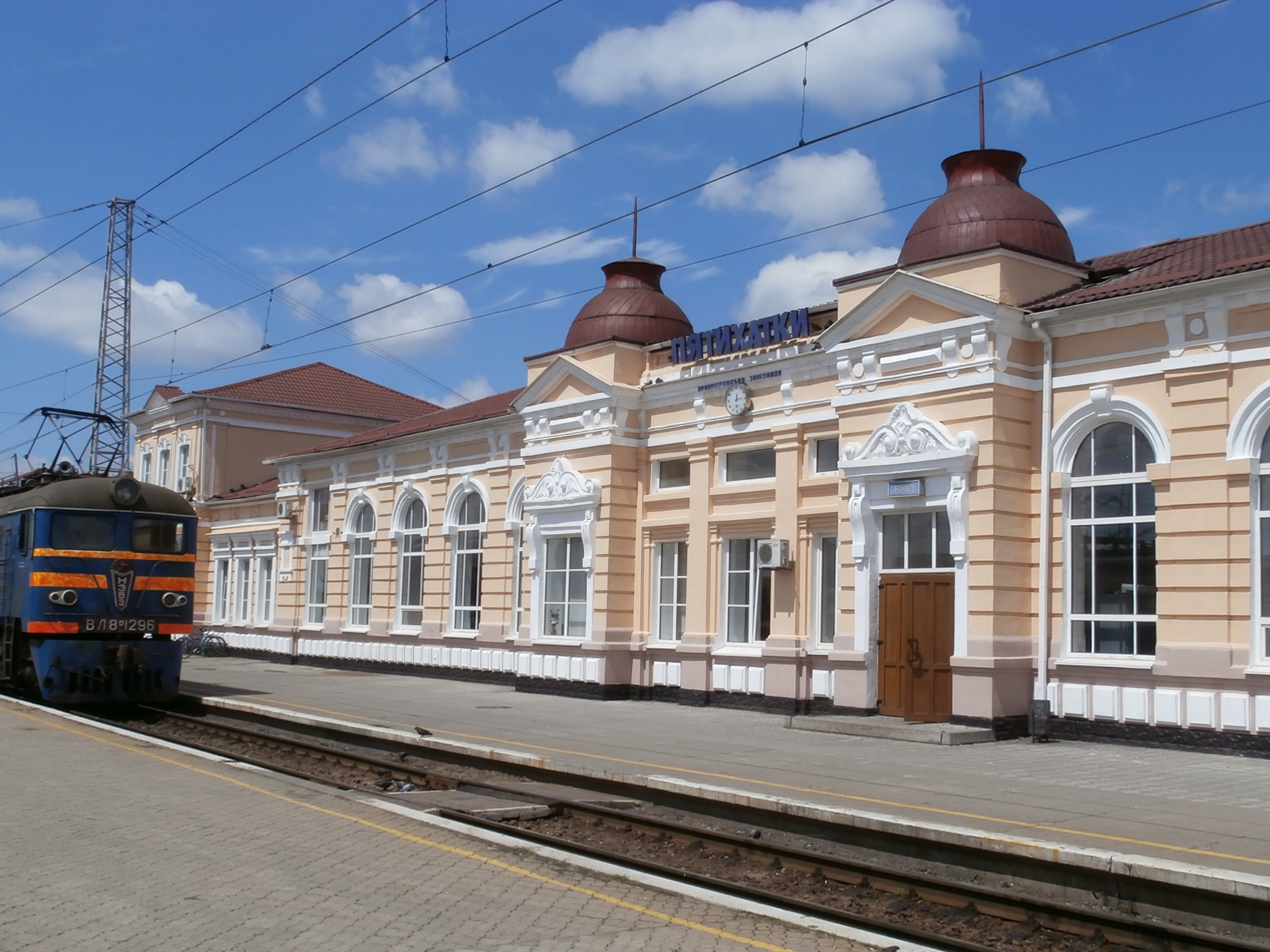 Pjatychatky Bahnhof